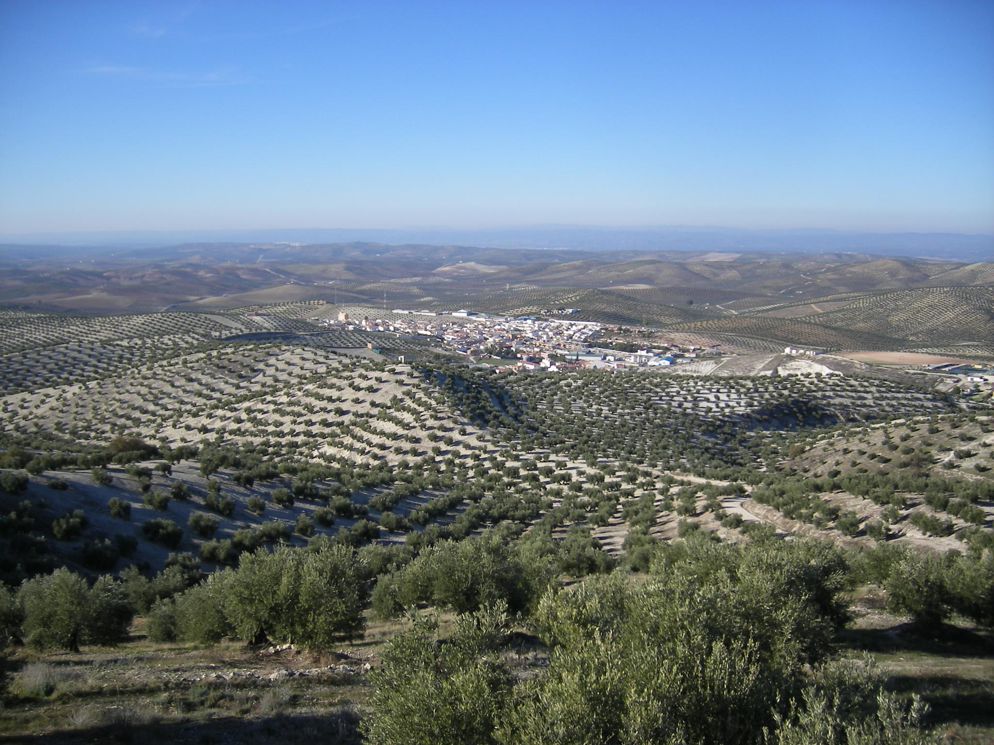 Vistas de Fuerte del Rey desde la Loma de la Noria